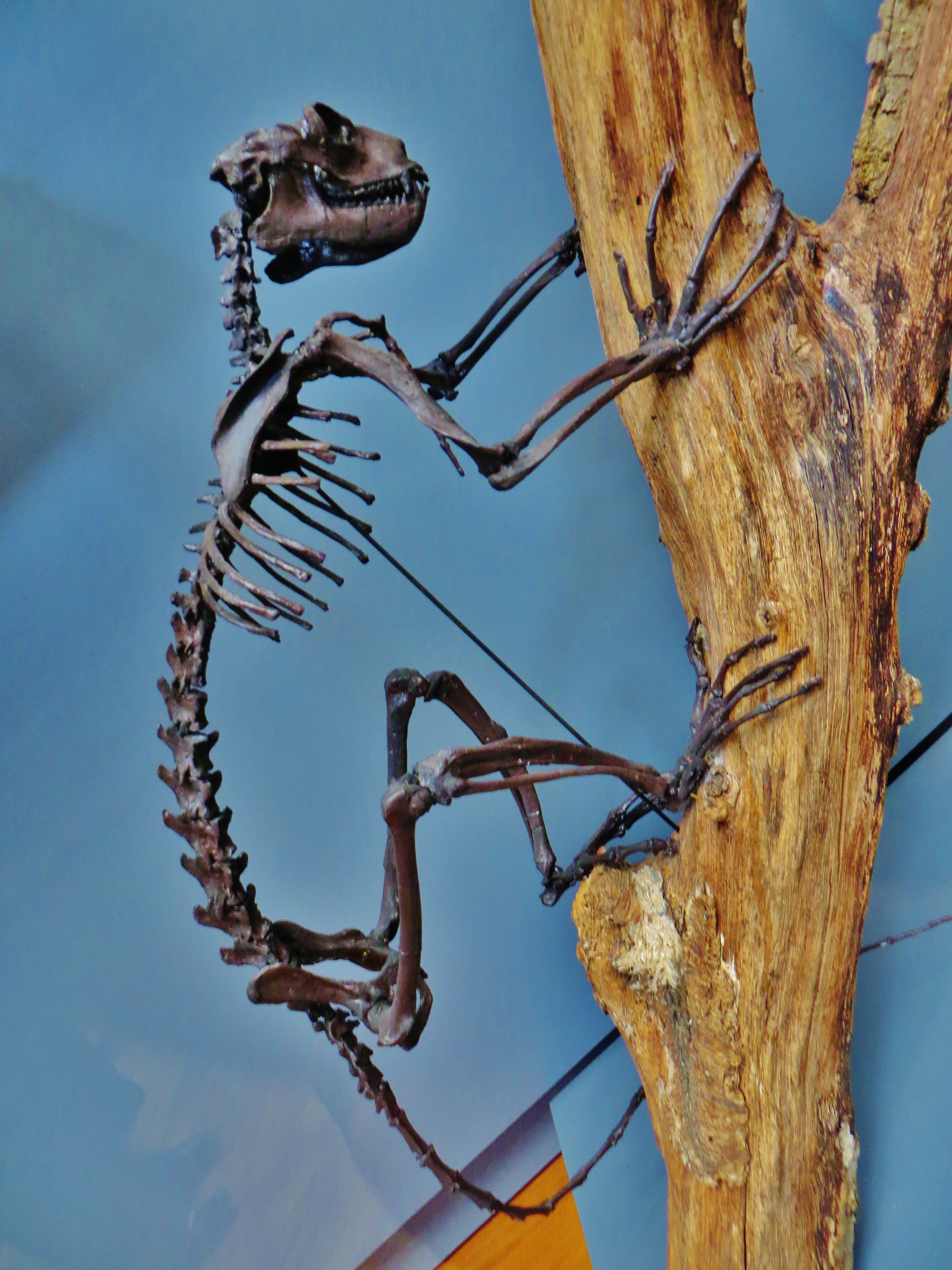 Fossil of Notharctus, an extinct mammal - Took the picture at Musee d'Histoire Naturelle, Paris